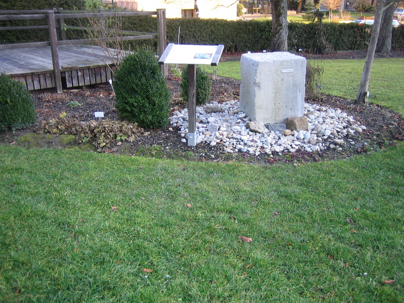 Quellstein im Kräutergarten Bad Mühllacken